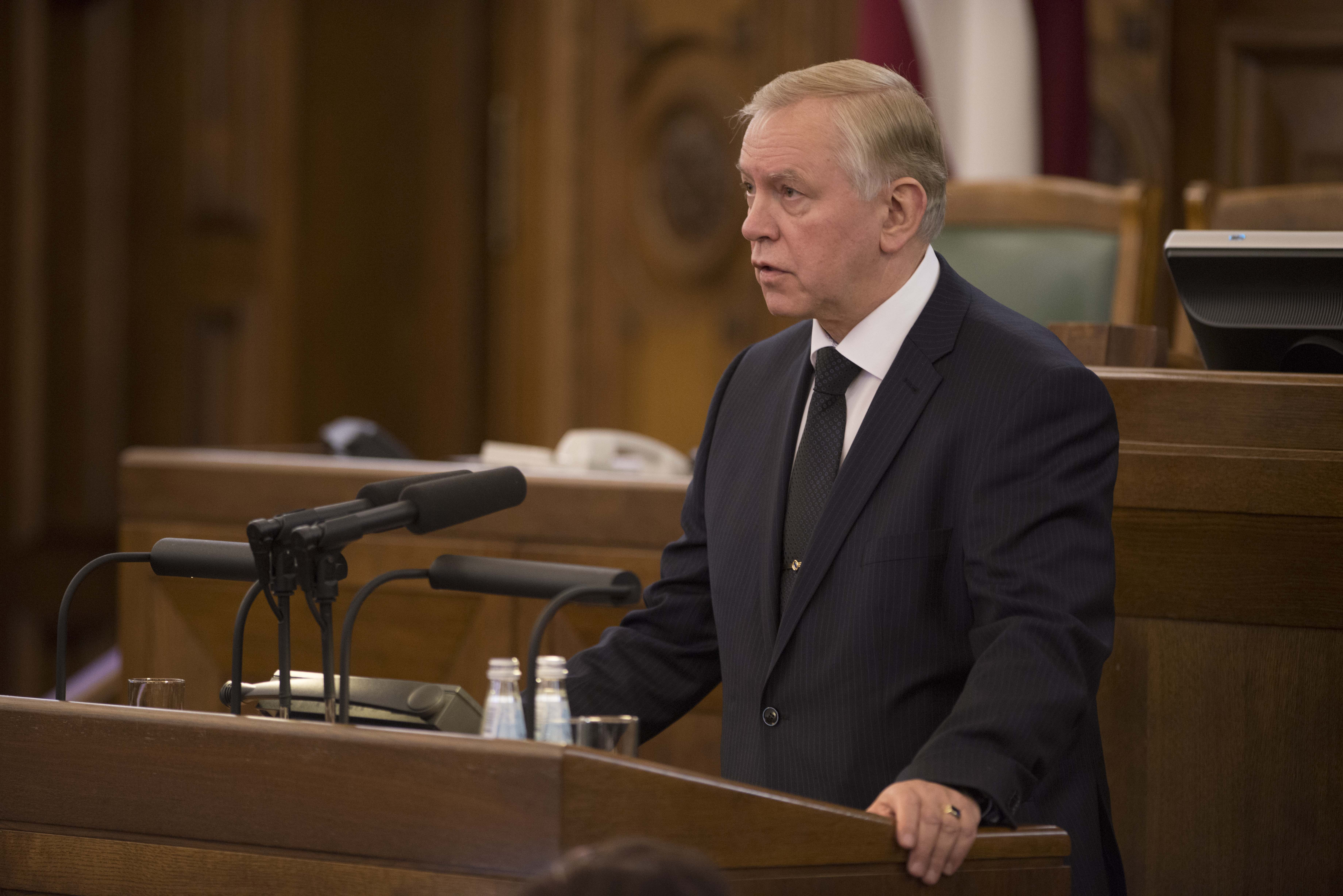 2014.gada 4.novembris. Deputāts Augusts Brigmanis dod svinīgo solījumu. Foto: Juris Vīgulis, Saeimas Kanceleja Izmantošanas noteikumi: saeima.lv/lv/autortiesibas